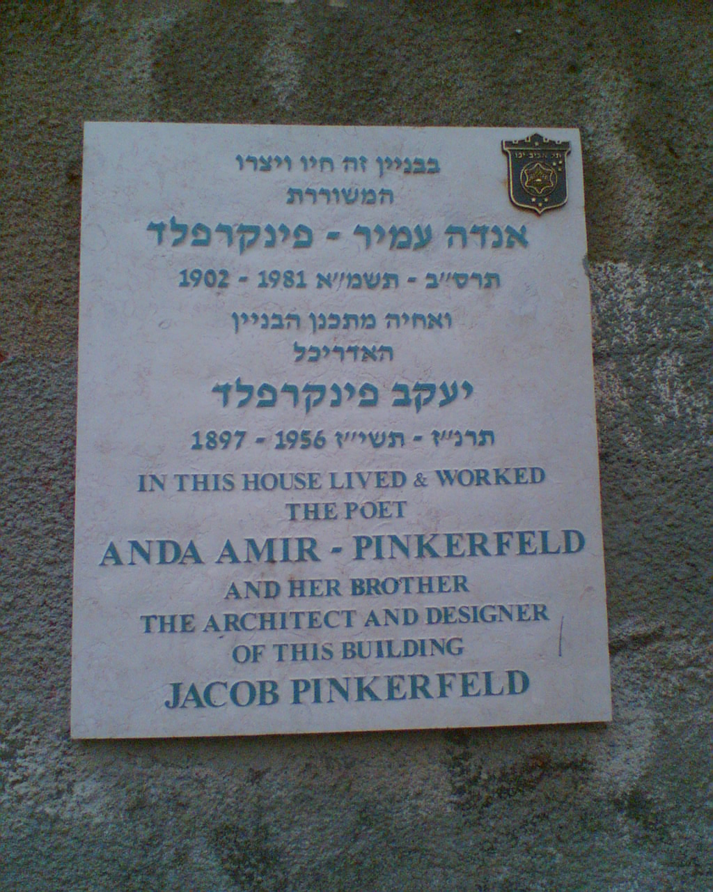 לוח לזכרם של אנדה עמיר-פינקרפלד ואחיה יעקב פינקרפלד, בחזית הבית שבו התגוררו, ברחוב רש"י בתל אביב